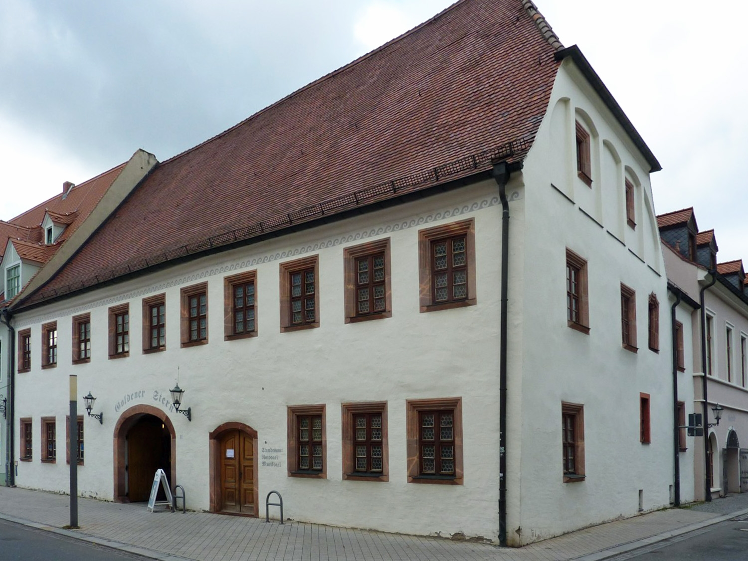 Borna, ehemaliger Gasthof Goldener Stern, heute Bürgerhaus, am Markt